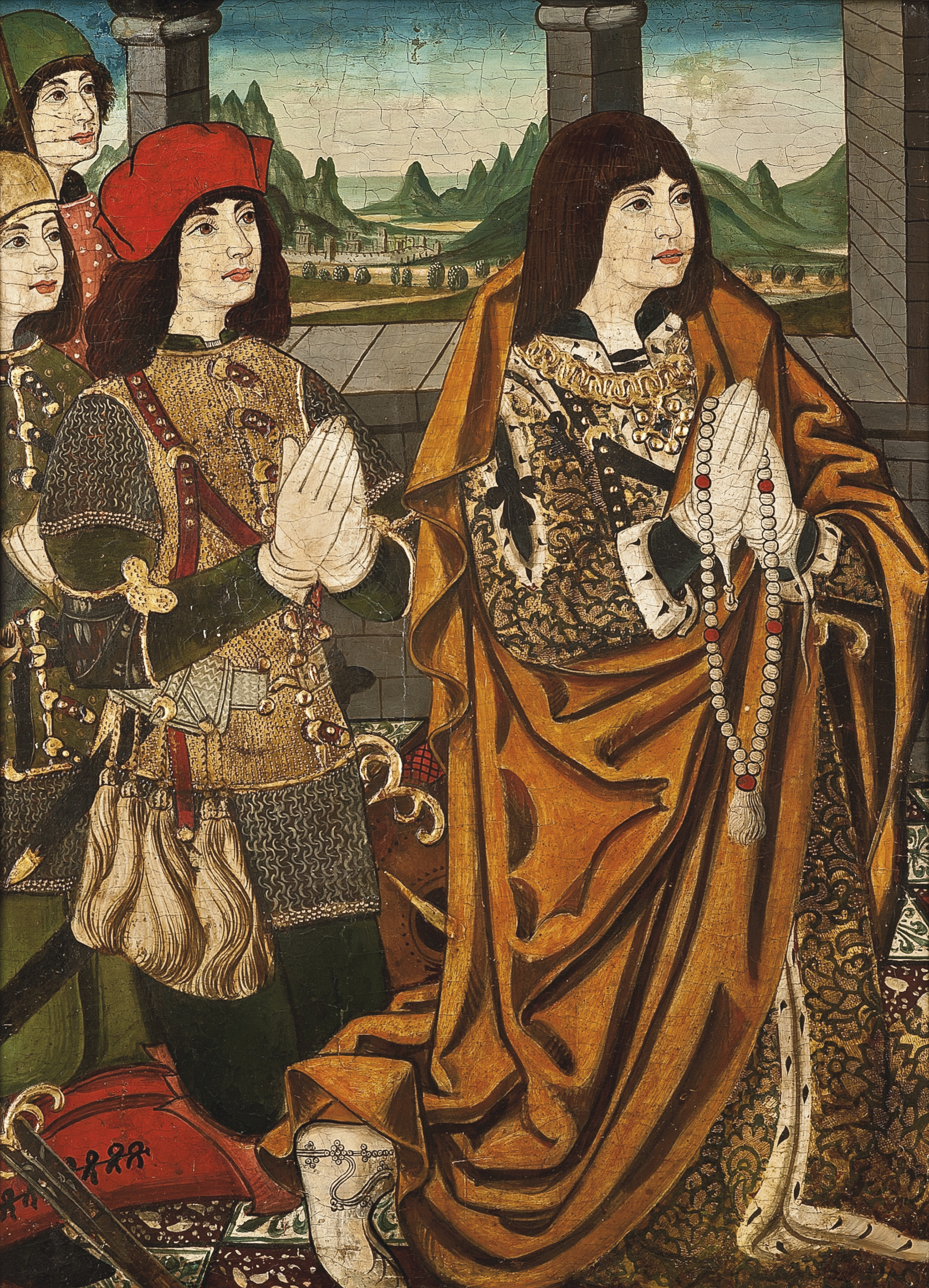 Joan Pau Guardiola-Miracle de la Mare de Déu del Roser i el cavaller de Colònia